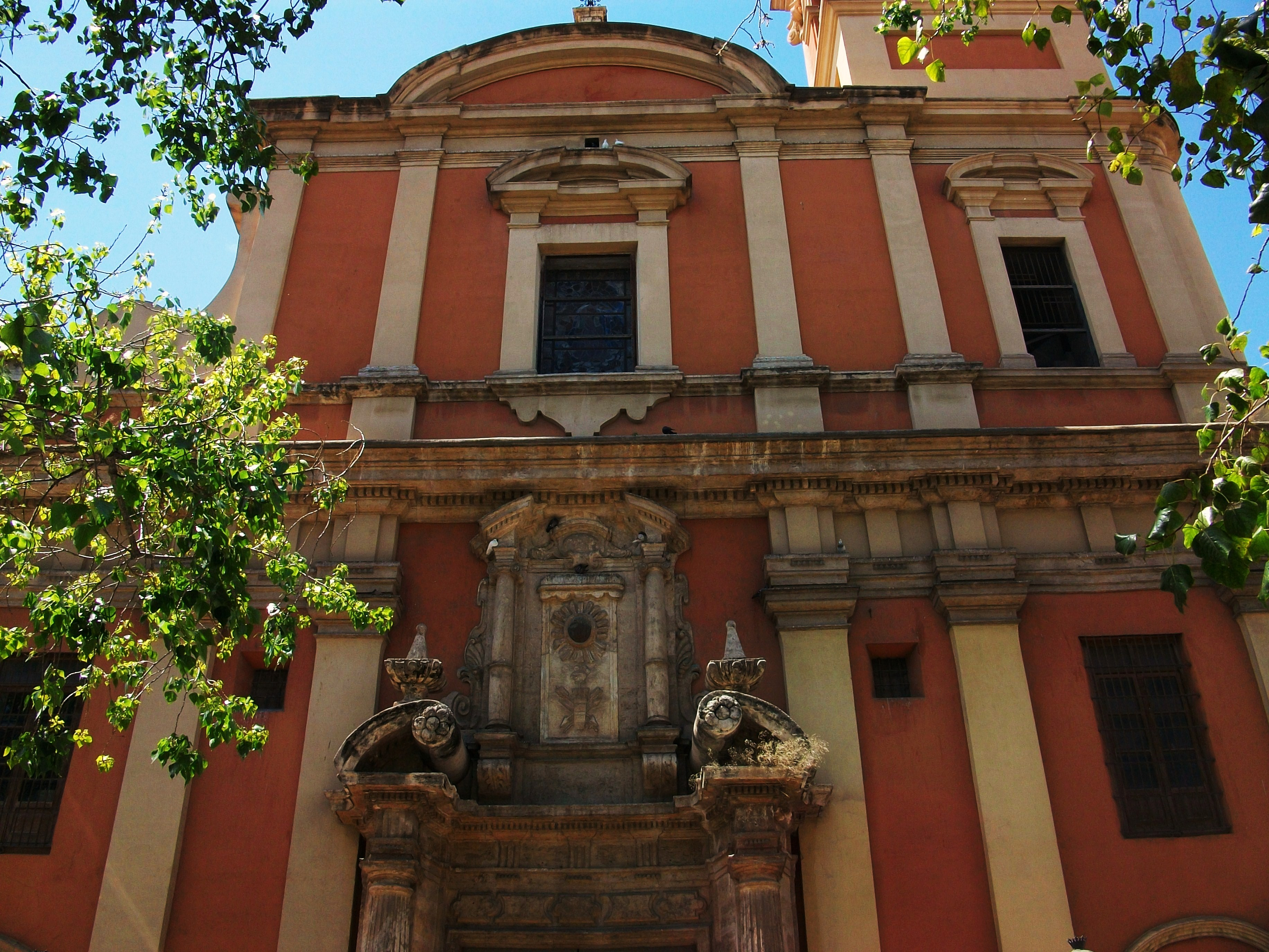 Façana de l'església de Sant Sebastià de València.